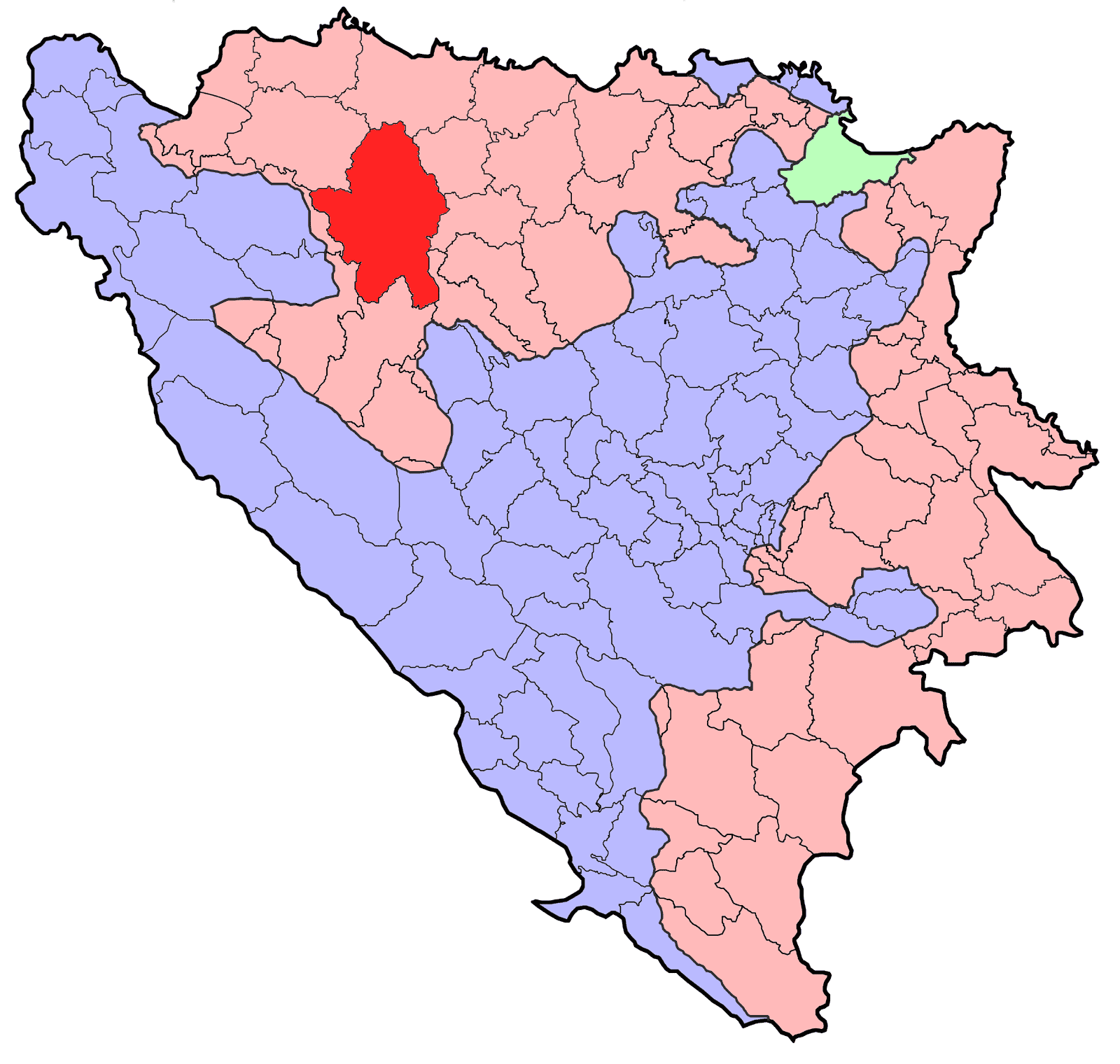 Republika Srpska (BiH) municipality